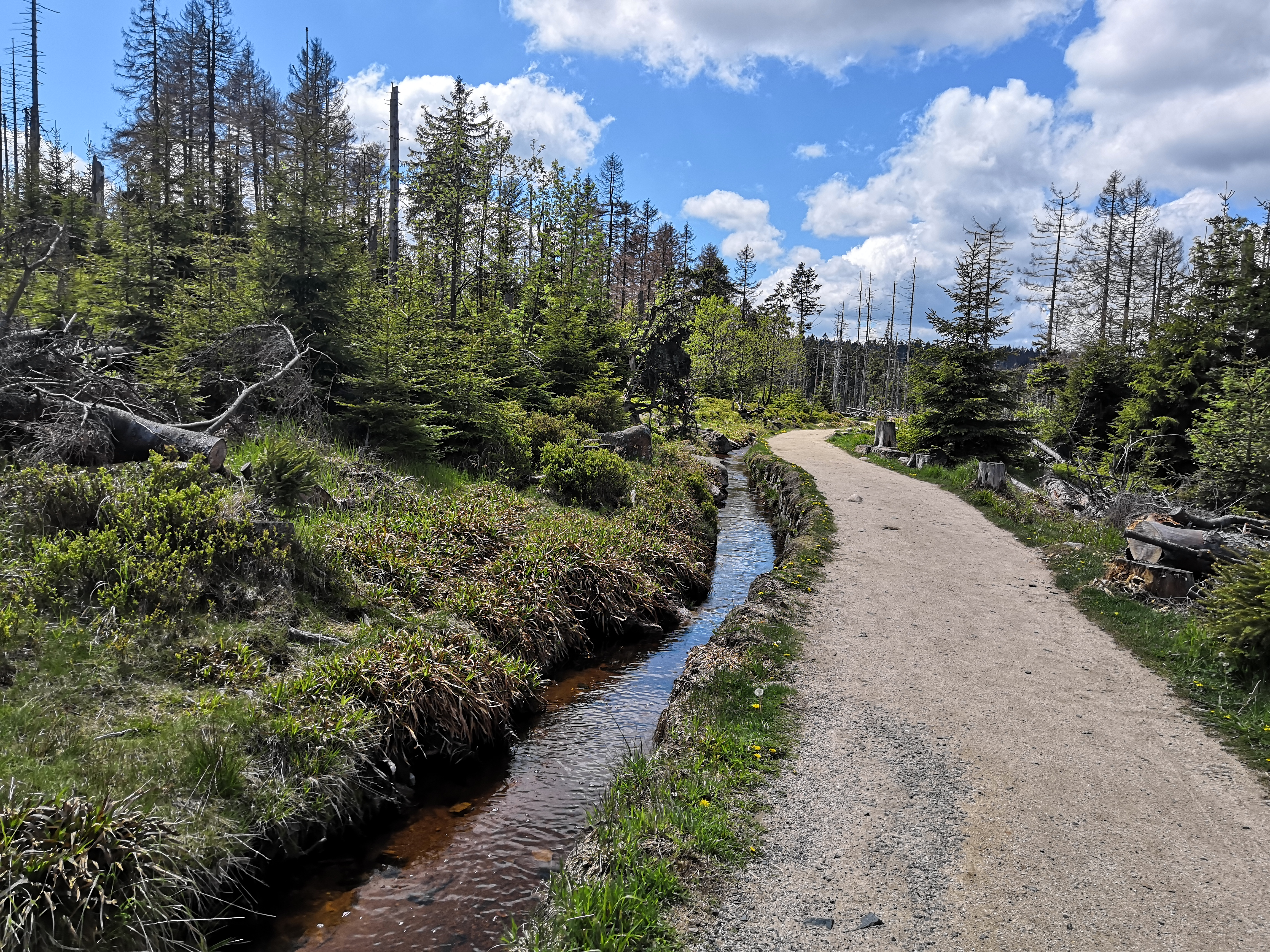 Der Abbegraben begleitet teilweise den Goetheweg im Nationalpark Harz am Fuße des Brocken. Er ist ist 1,5 km lang, wurde 1827 gebaut und ist Bestandteil der UNESCO-Welterberstätte "Erzbergwerk Rammelsberg, Altstadt Goslar, Oberharzer Wasserwirtschaft